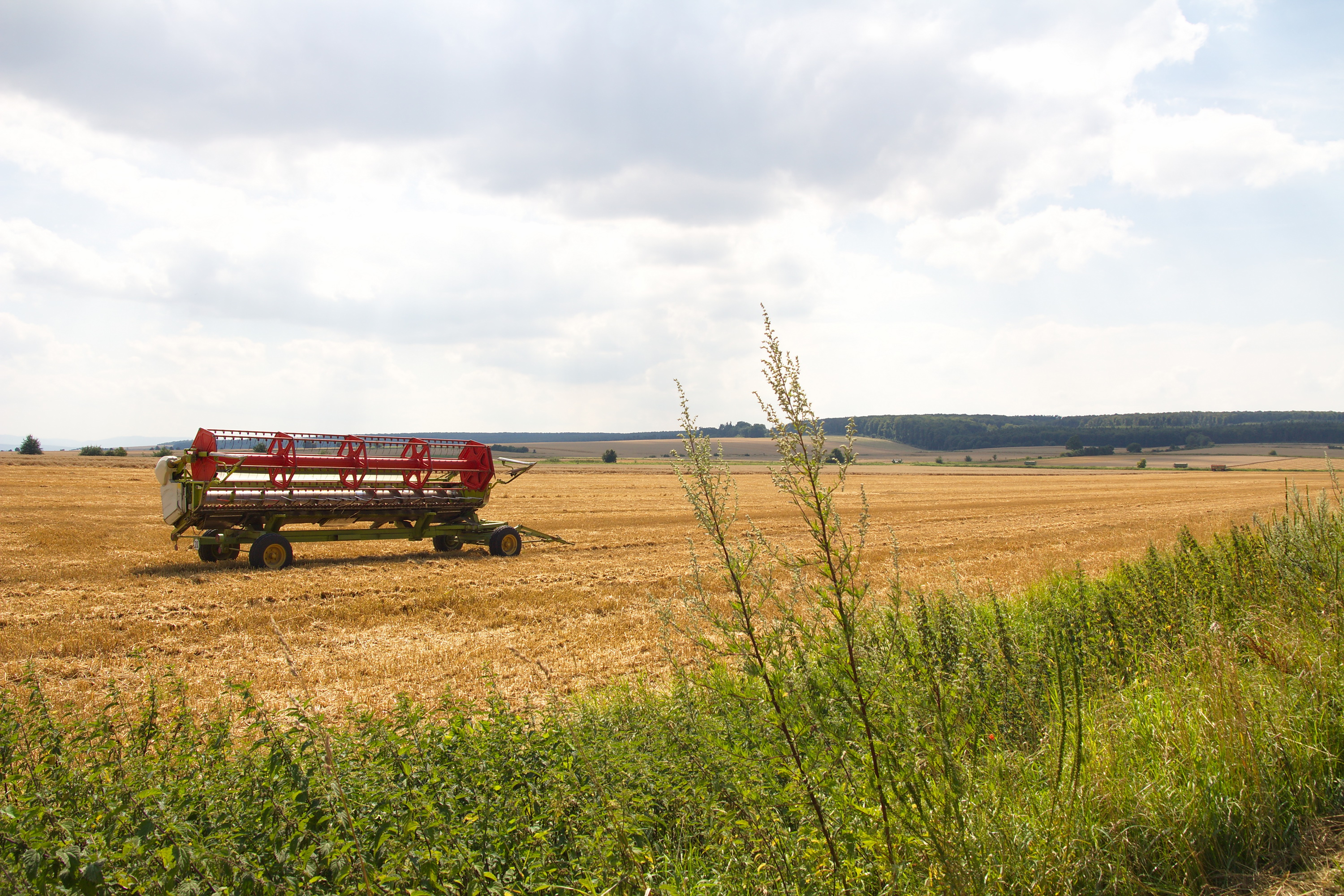 Blick von Ohrum zum Oderwald, Niedersachsen, Deutschland